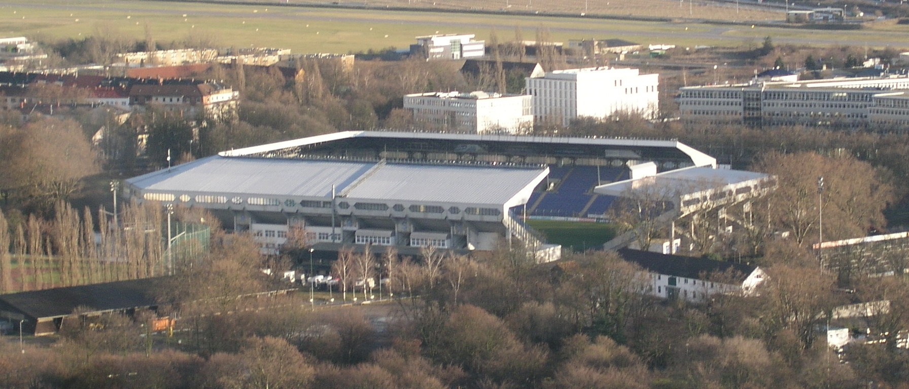 Carl-Benz-Stadion Mannheim aus Sicht vom Fermeldeturm.